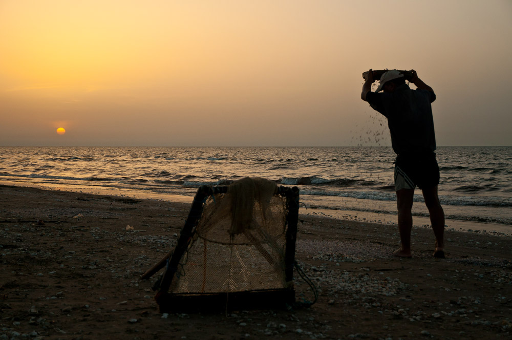 صيد المحار و ام الخلول من امام شواطئ بورسعيد This is an image of food from Egypt